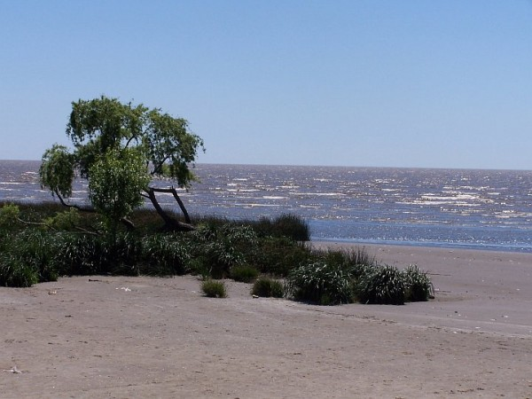 Formación evidente de Vegetación sobre la arena de la playa puntalarense debido a la gran concentración de humedad que posee la misma.